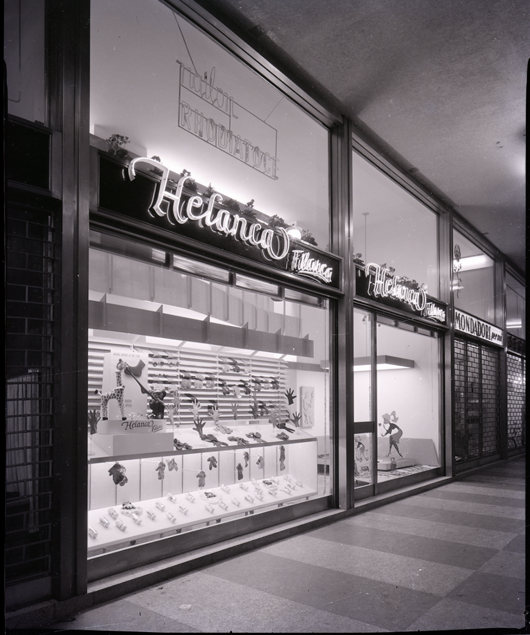 Servizio fotografico : Milano, 1965 / Paolo Monti. - Buste: 16, Fototipi: 16 : Negativo b/n, gelatina bromuro d'argento/ pellicola ; 10x12. - ((Serie costituita da 16 buste di negativi, identificati con i nn.: 3661, 3662, 3663, 3664, 3665, 3666, 3667, 3668, 3669, 3670, 3671, 3672, 3673, 3674, 3675, 3676, e tenute insieme con da una graffetta. - Sulla busta identificata con il n. 3661 iscrizione didascalica manoscritta a matita. - Le buste sono numerate da 1 a 16. - Sul coperchio della scatola iscrizione didascalica manoscritta a penna: "Arch. Pozzi". - Il filato con il nome di "Helanca" inventato alla fine degli anni Cinquanta dal marchio Wolford, in Italia è conosciuto come "Filanca". - Fonte: Quaderno ad anelli di Paolo Monti: s.t. [Soggetti e committenti] (1956-1961), presso Archivio Paolo Monti